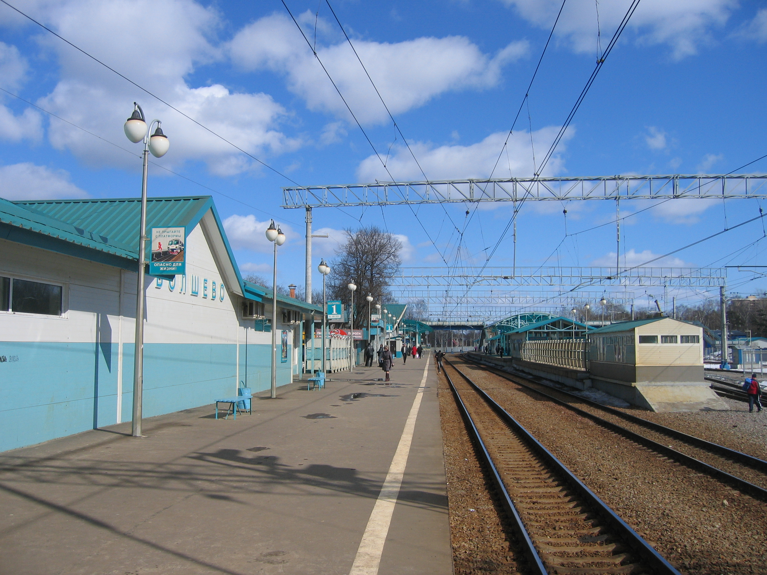 Железнодорожная станция Болшево в г. Королёв